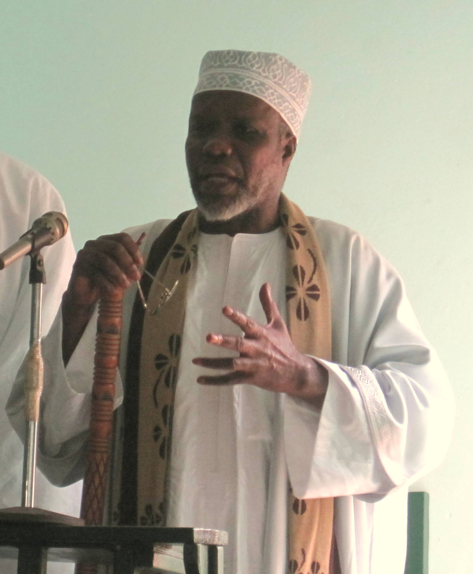 Cheikh Tidiane Gaye, lors de son dernier sermon de Korité, en 2010, à Louga.